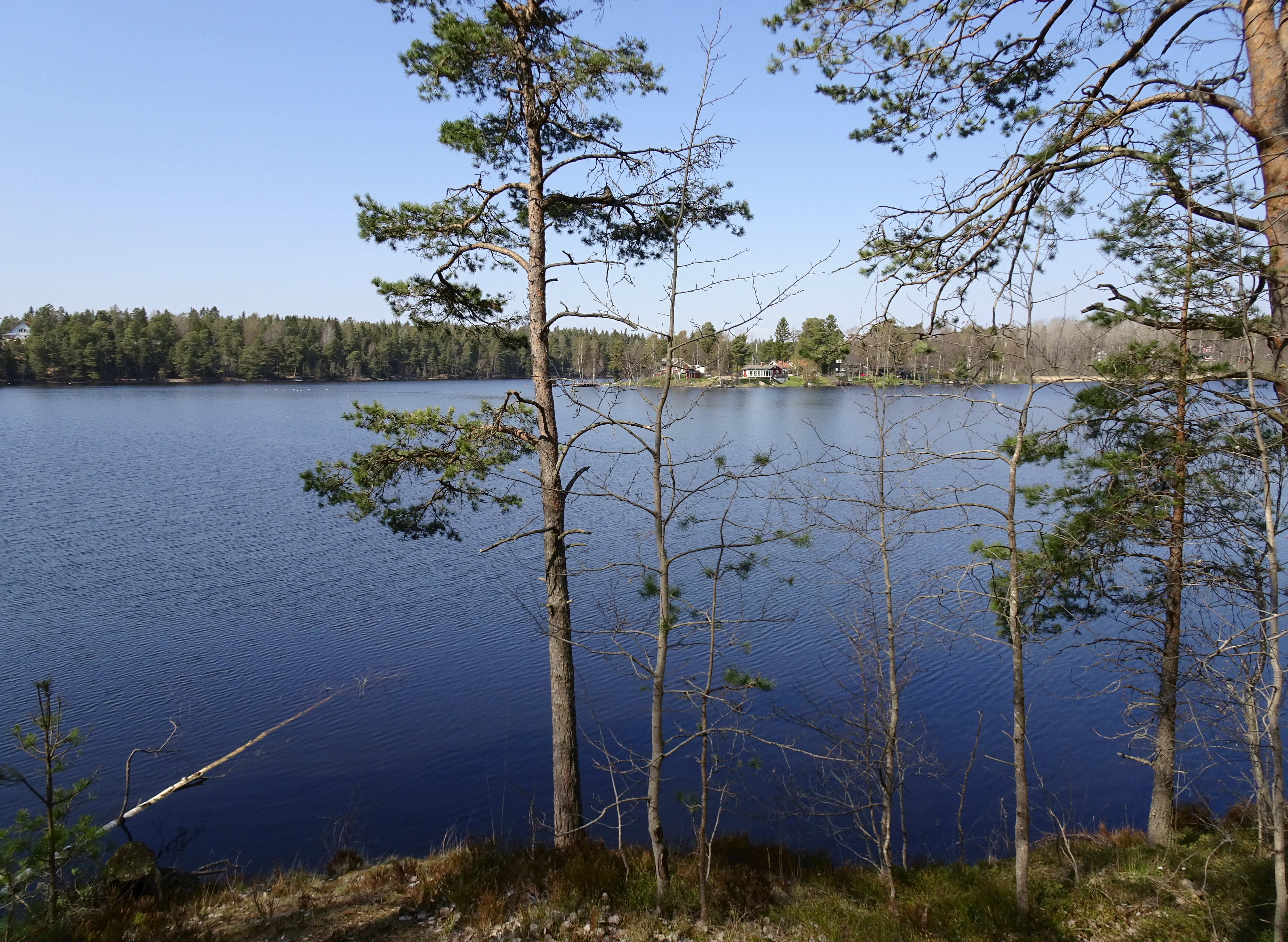 Gladö kvarn Kvarnsjön